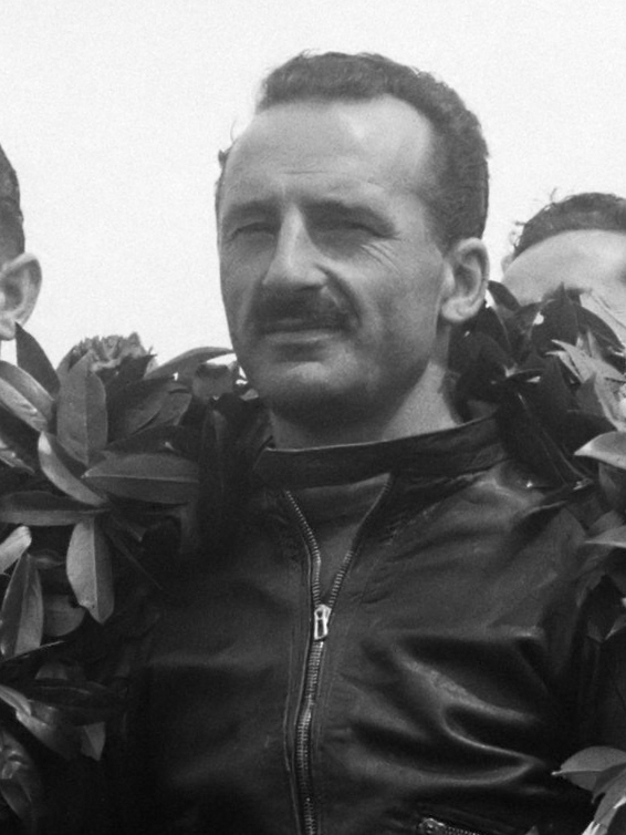 TT-races in Assen Gianni Leoni (winnaar 125 cc) huldiging 7 juli 1951